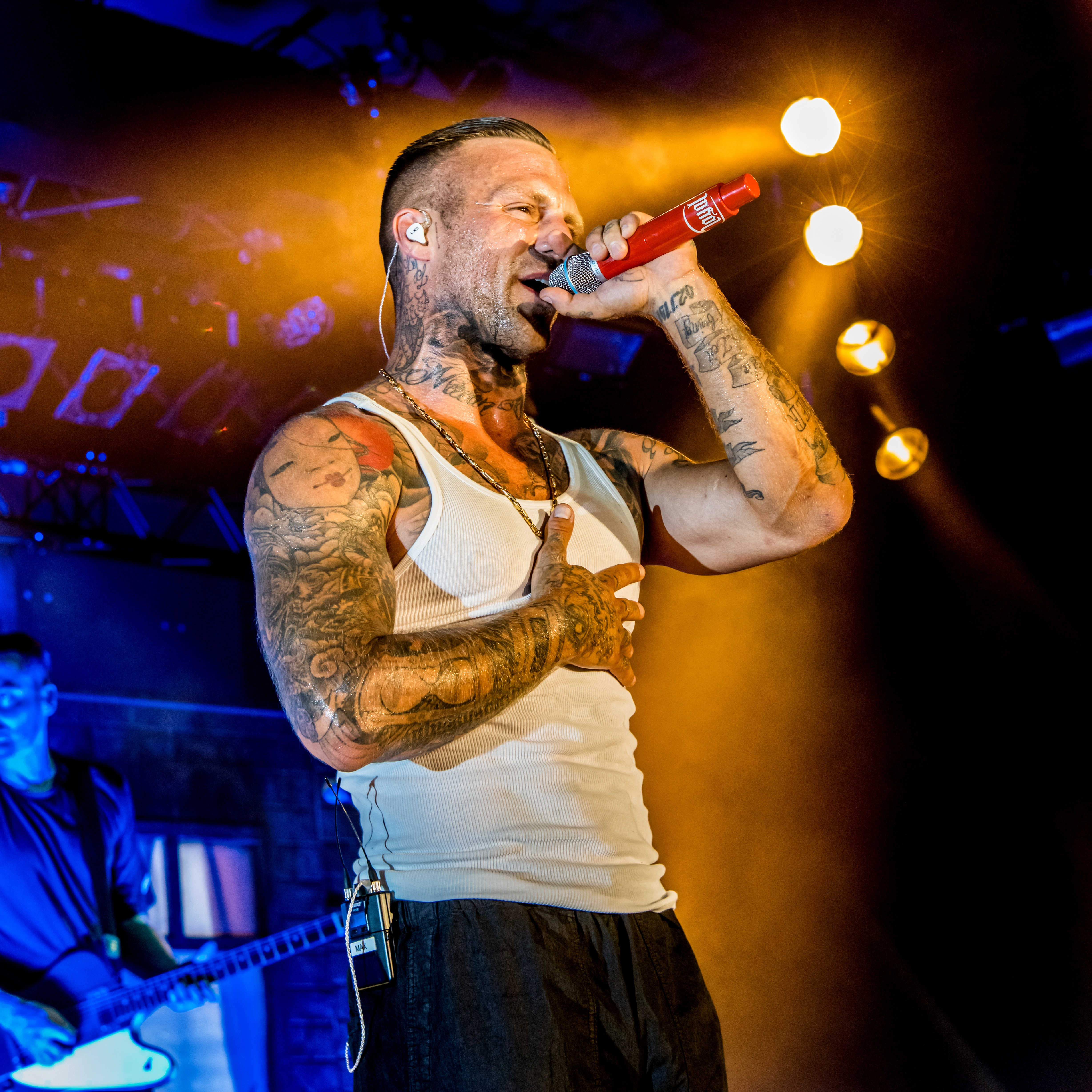 Bilder vom Zelt Musik Festival 2018 in Freiburg im Breisgau Kontra K am 27.07.2018 im Zirkuszelt